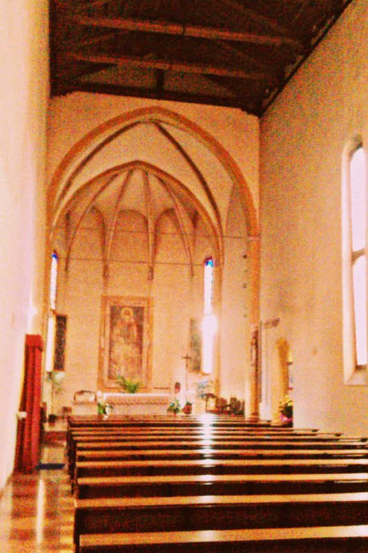 Chiesa di Sant'Antonio di Vienna a Padova